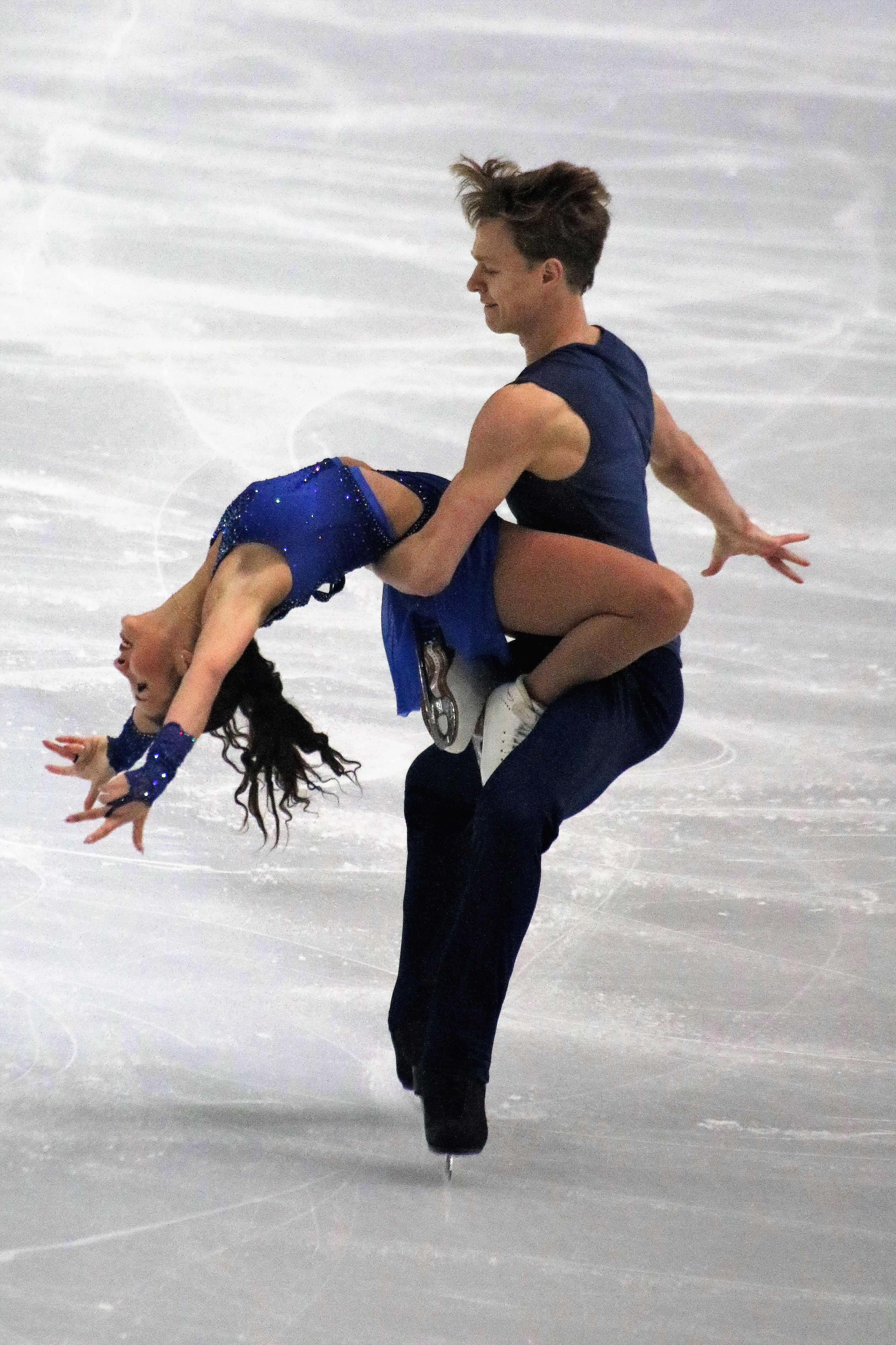 Диана Дэвис / Глеб Смолкин (Россия) на финале юниорского Гран-при 2019-2020